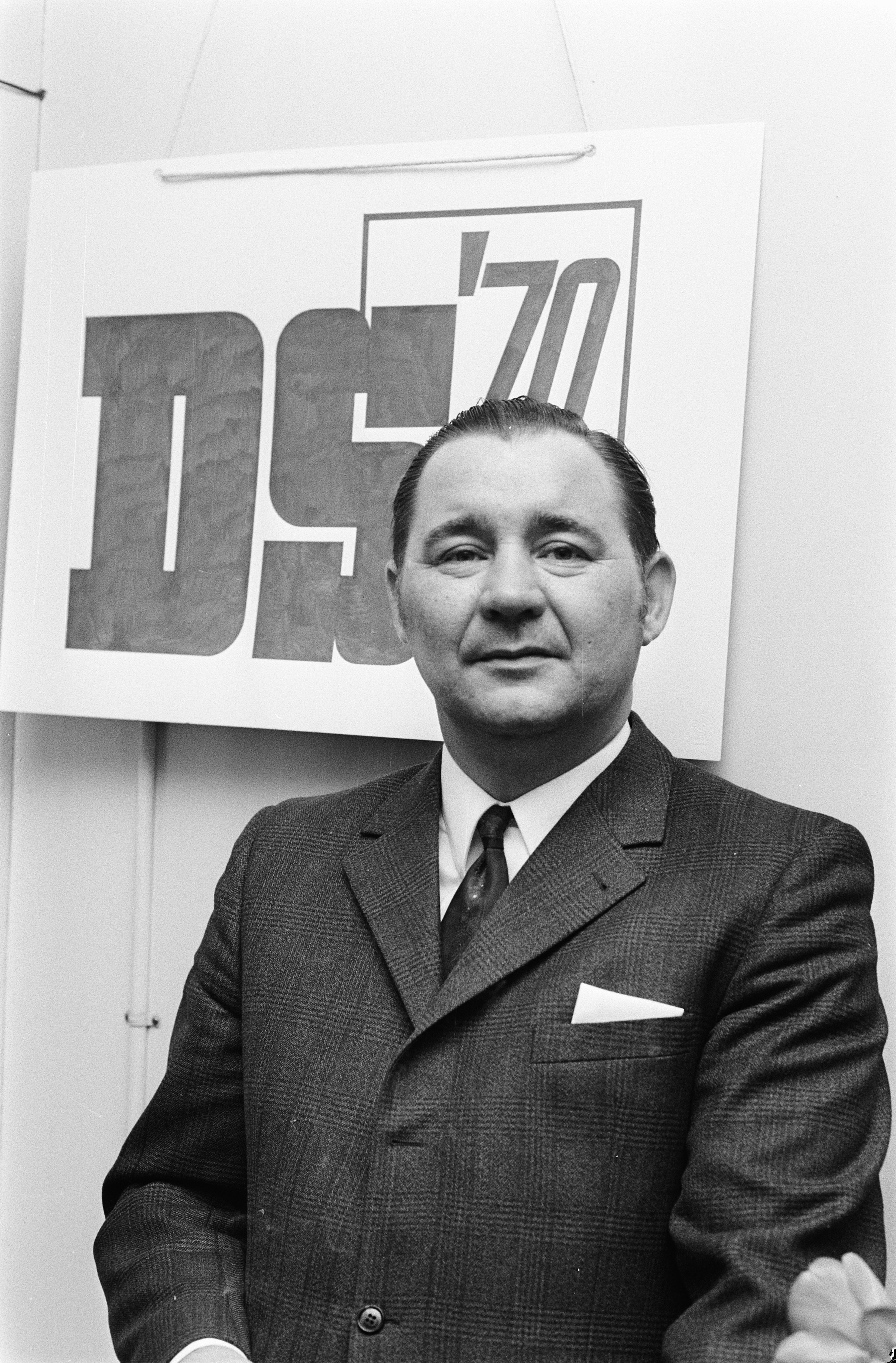 Collectie / Archief : Fotocollectie Anefo Reportage / Serie : [ onbekend ] Beschrijving : Partijbijeenkomst van de Democratisch-Socialisten 1970 (DS'70) in Den Dolder; dhr. H. Pors jr. Datum : 4 april 1970 Locatie : Den Dolder, Utrecht (prov) Trefwoorden : conferenties, politici, portretten Persoonsnaam : Pors, H. Fotograaf : Verhoeff, Bert / Anefo Auteursrechthebbende : Nationaal Archief Materiaalsoort : Negatief (zwart/wit) Nummer archiefinventaris : bekijk toegang 2.24.01.05 Bestanddeelnummer : 923-4048